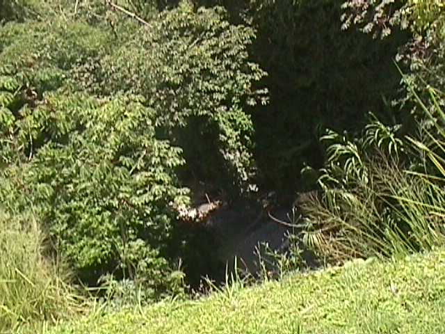 Vegetacion en el curso de la quebrada La Boyera (Las Esmeraldas)